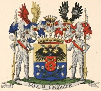 Lieveni suguvõsa krahvivapp (Venemaa)